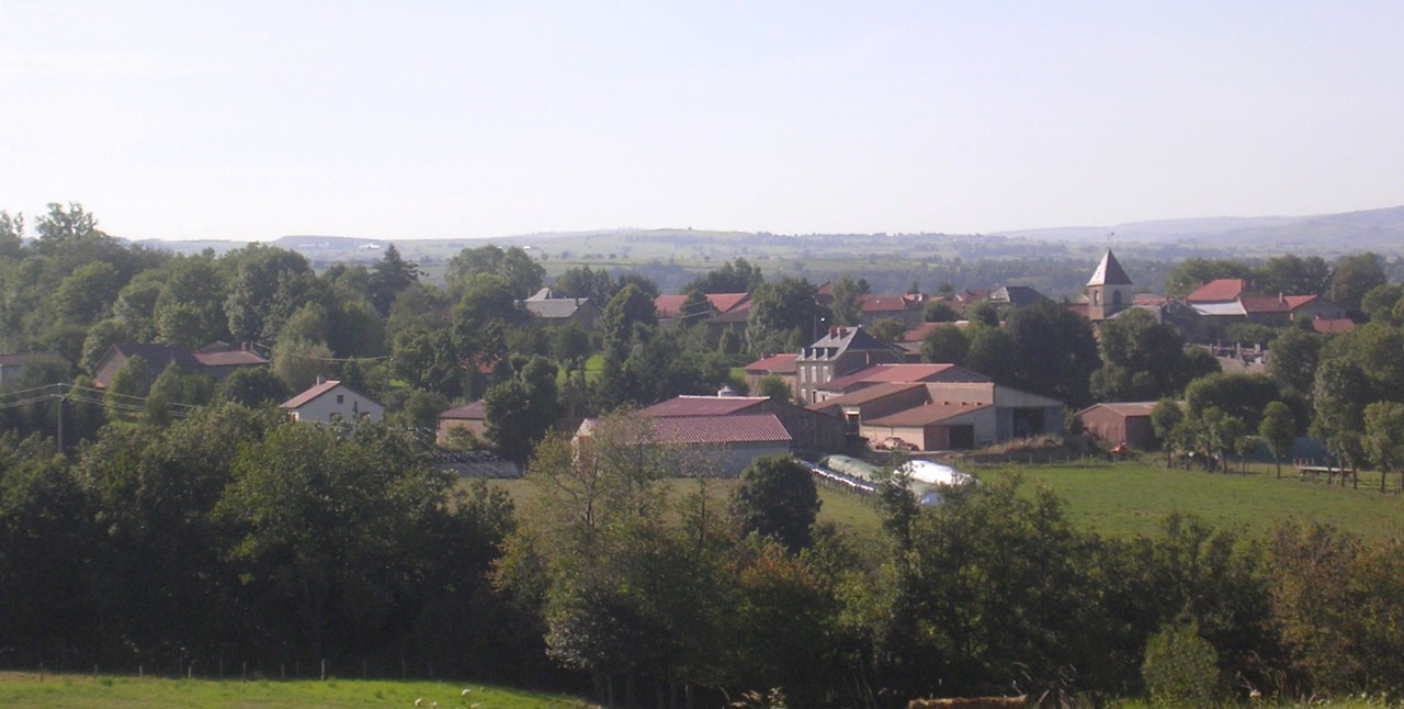 Village de Saint-Mary le Plain (15) france